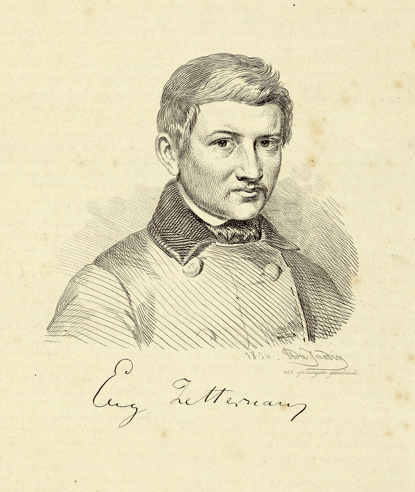 Portret van de Vlaamse schrijver Eugeen Zetternam (1826-1855) door Edward Dujardin